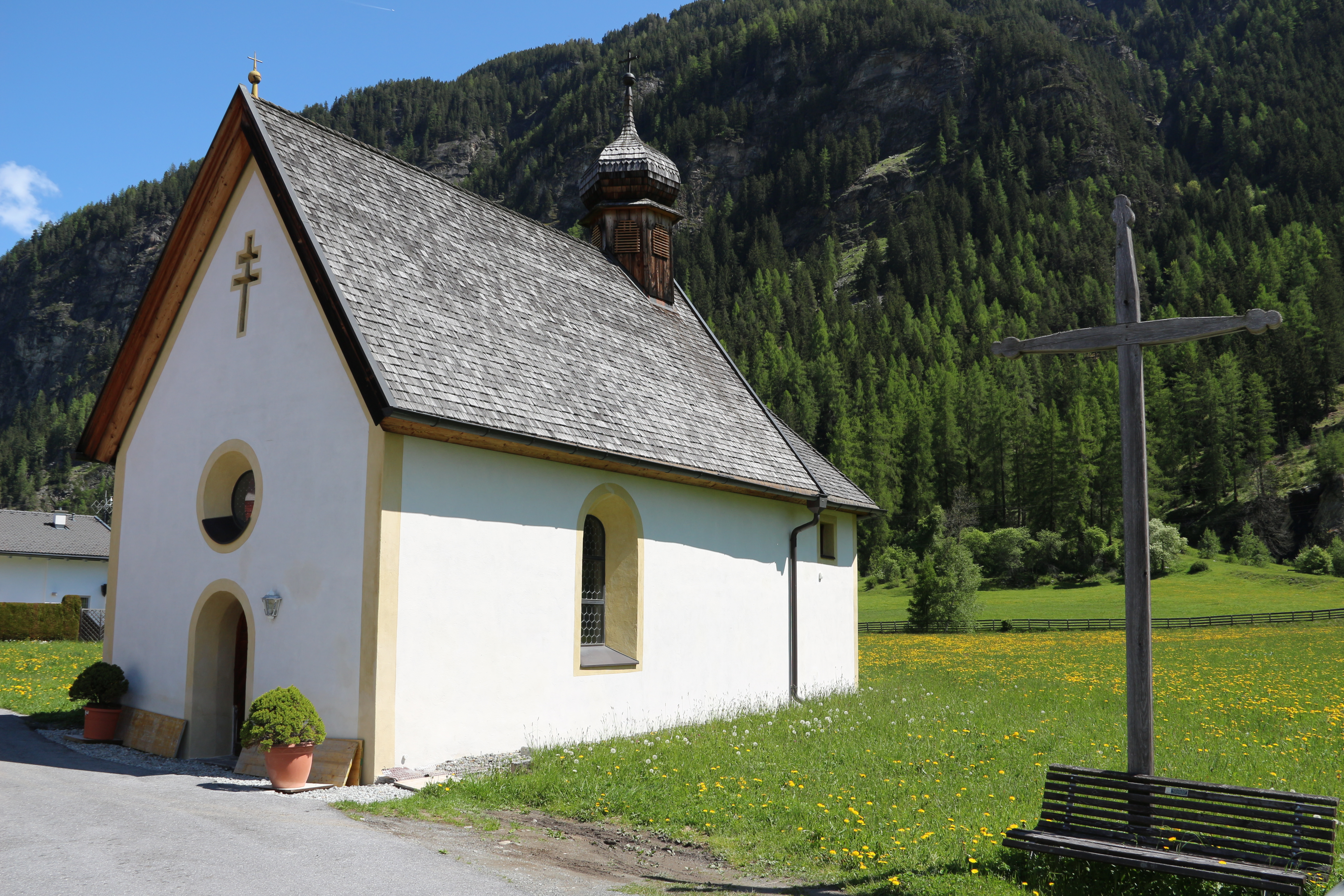 Ortskapelle Maria-Loreto in Au, Gemeinde Längenfeld, Tirol.